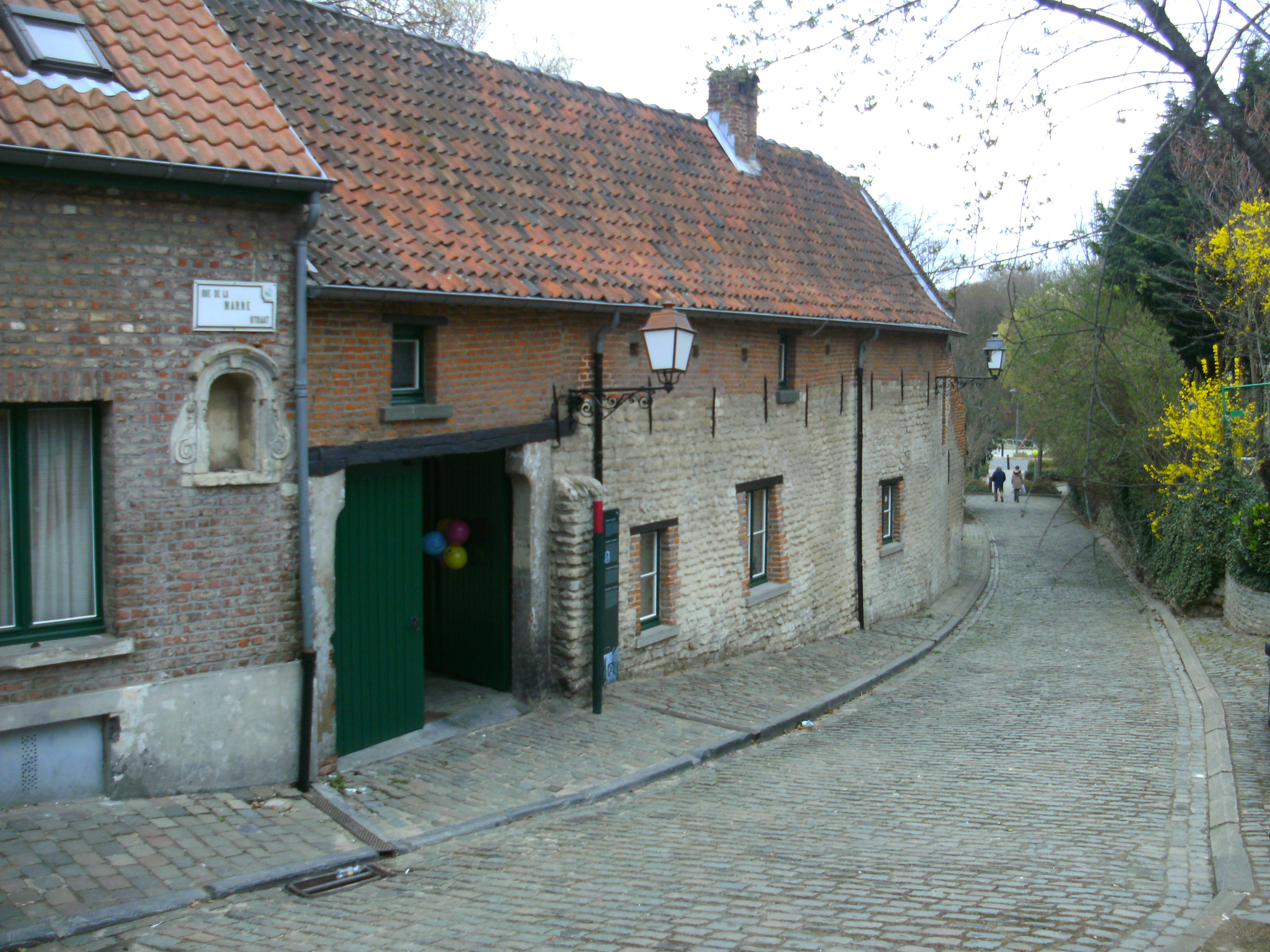 Fermette 't Hoeveke à Evere - façade avant